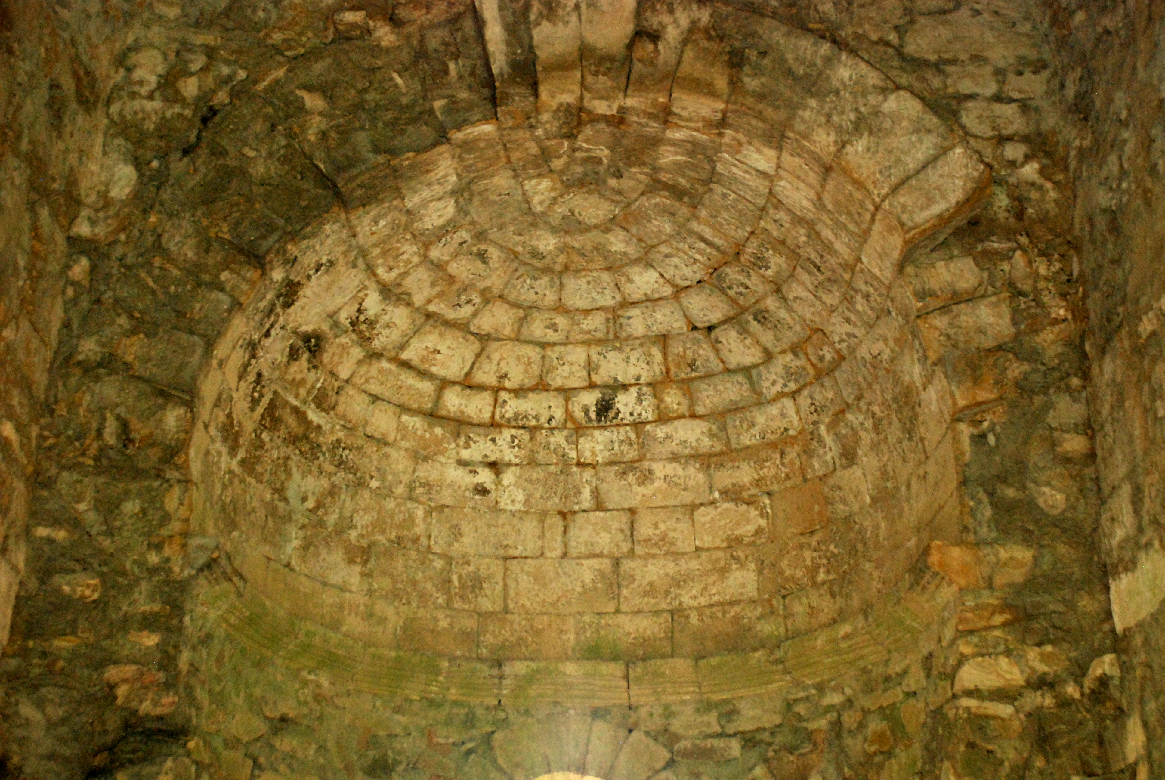 France - Gard - Saint-Étienne-des-Sorts - Chapelle Saint-Pierre